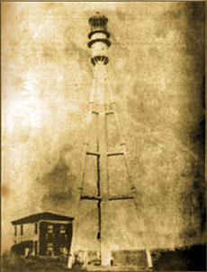 Farol de Nazaré: O Farol Velho de Nazaré foi construído no final do século XIX, feita em formato de tripé e com iluminação de querosene. Foi desativada nos anos 40